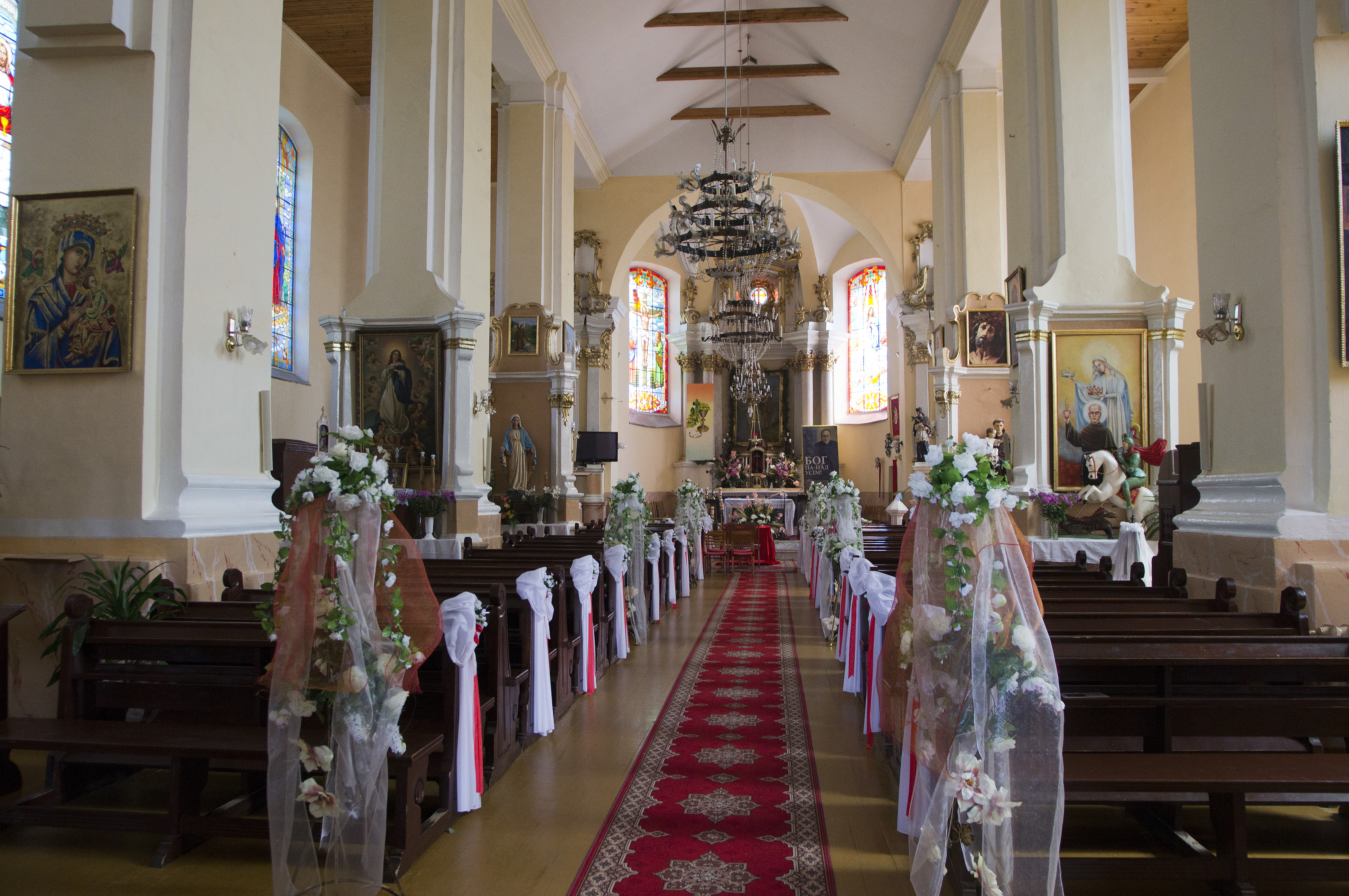 Беларуская (тарашкевіца): Касьцёл Яна Хрысьціцелясем алтароў касьцёлу. в. Васілішкі This is a photo of Belarusian heritage monument. Reference number: 412Г000616 ( WLM)